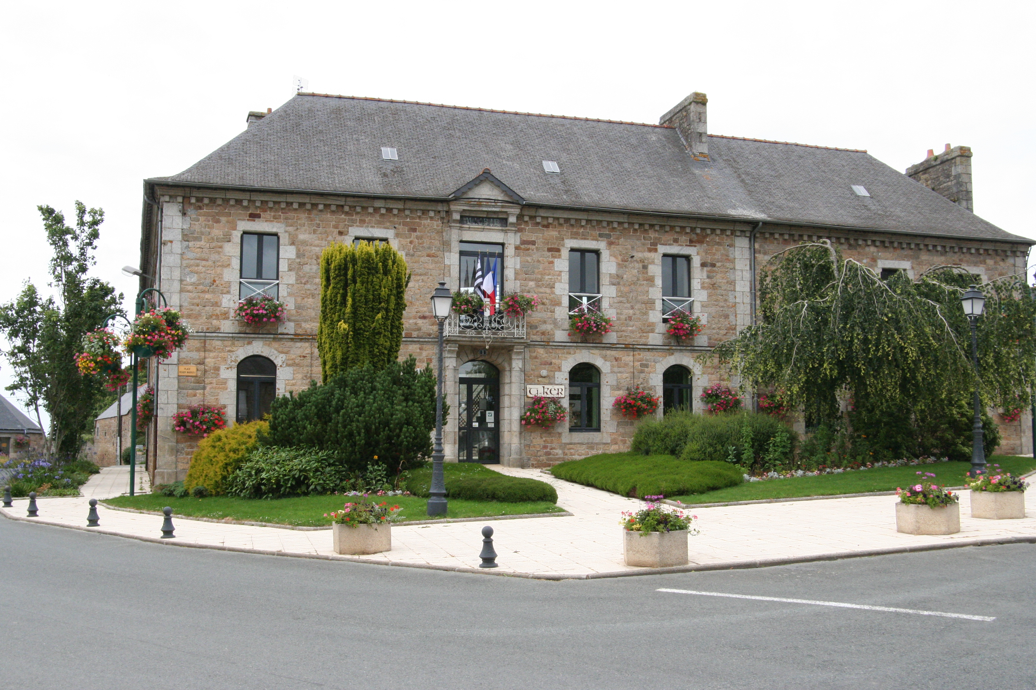 Mairie de Louargat.